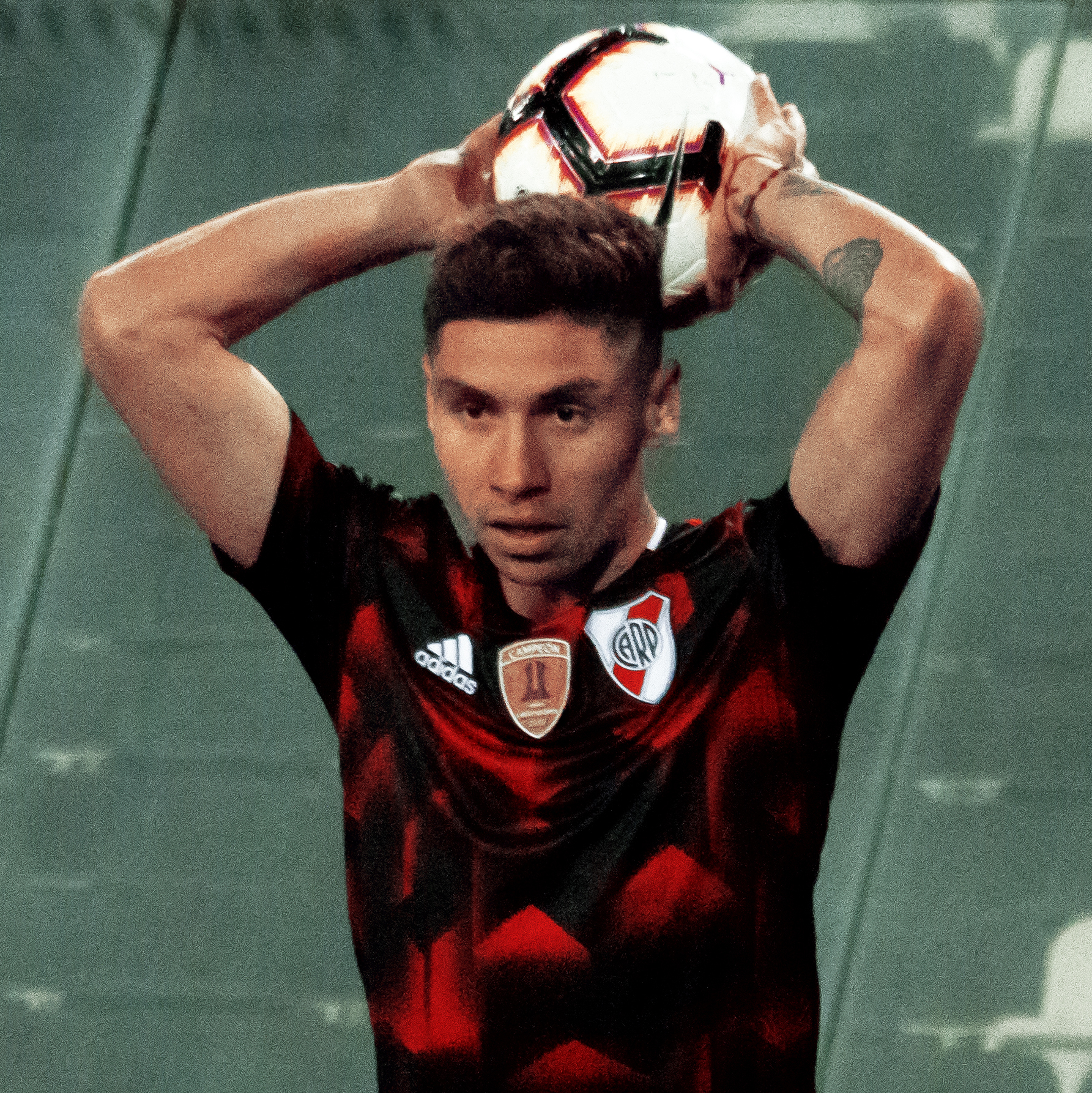 Palestino v River Plate, Estadio Monumental, Macul, Santiago, Región Metropolitana, Chile.